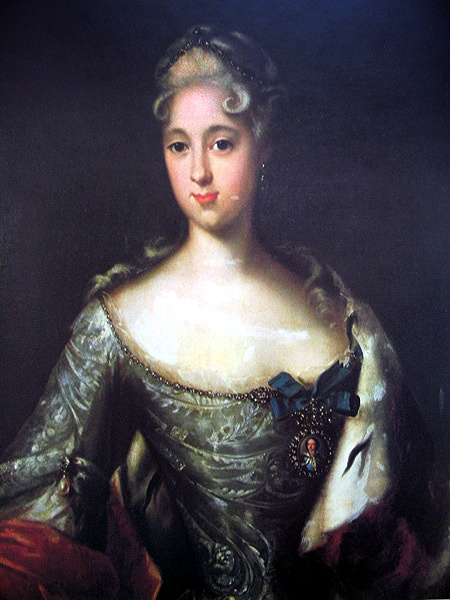 Портрет Марии Александровны Меншиковой. Меншиков дворец, Санкт-Петербург